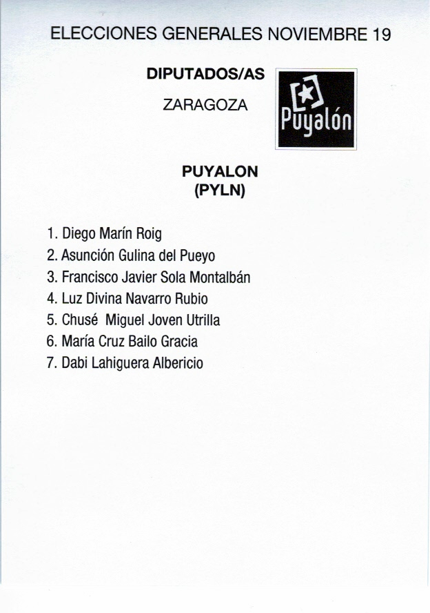 Papeleta electoral de Puyalon (PYLN) para el Congreso - Elecciones Generales de España de noviembre de 2019, circunscripción de Zaragoza.